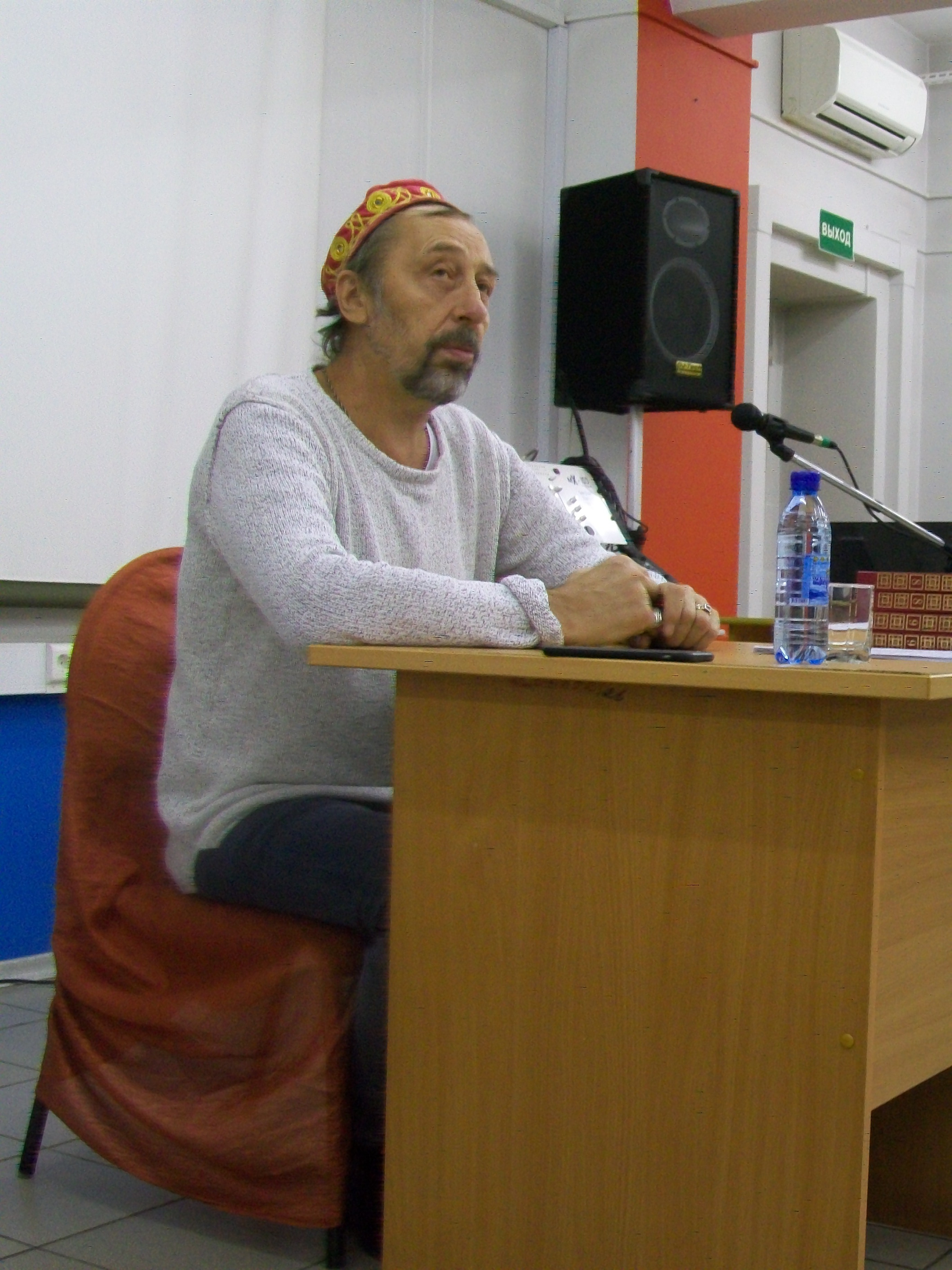 Николай Владимирович Коляда в Свердловской областной универсальной научной библиотеке им. В.Г. Белинского на библионочи 21 апреля 2017 года